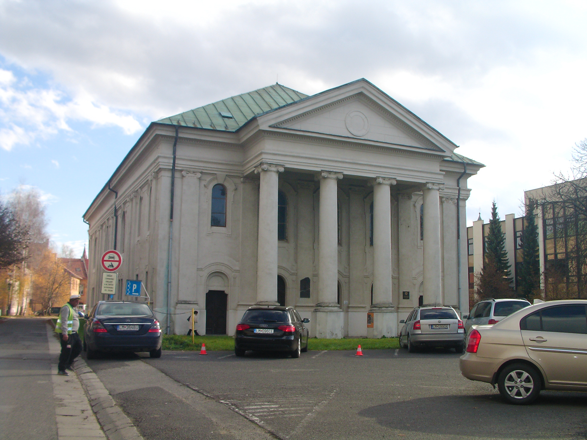 בית הכנסת בליפטובסקי מיקולש